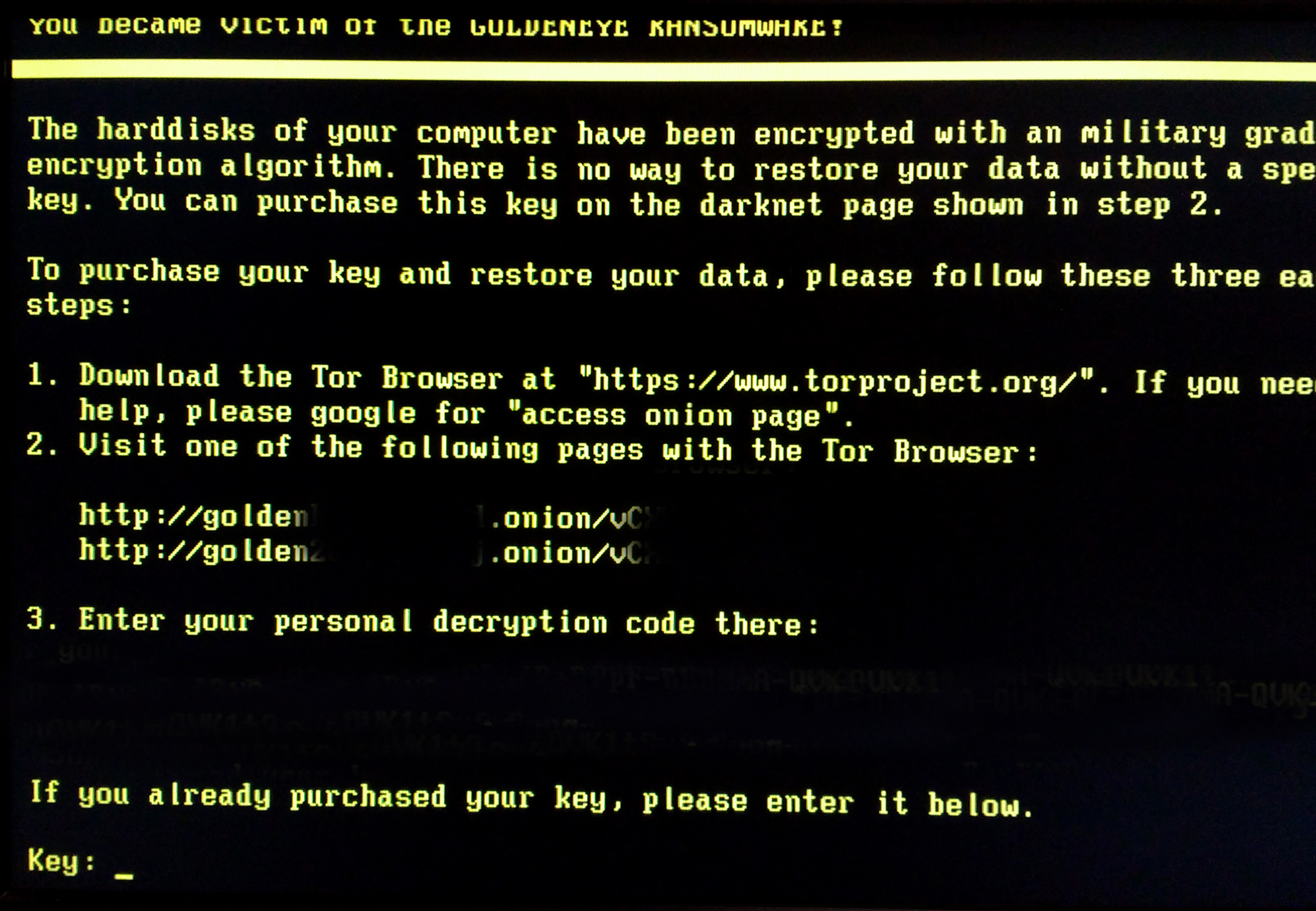 Bildschirmfoto von Goldeneye Ransomware. Personal decryption code entfernt. Darknet URL teilweise entfernt.